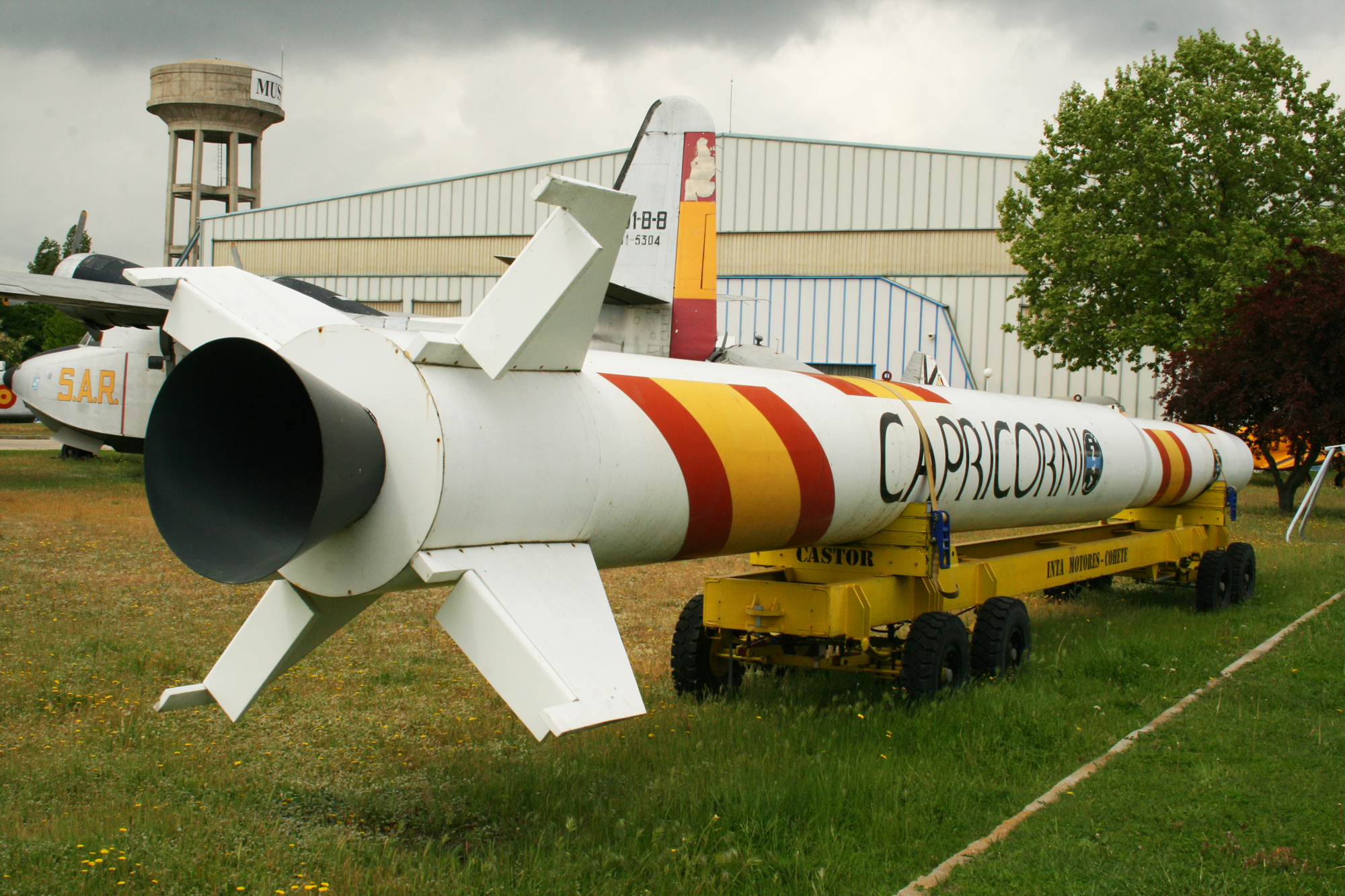 Maqueta a escala real del Cohete Capricornio, proyecto de lanzador de satélites artificiales desarrollado por INTA en España desde 1992 y cancelado en 2000. Museo del Aire de Cuatro Vientos (Madrid, España). Rocket Capricornio Real scale model of the Rocket Capricornio, project of artificial satellite launcher developed by INTA in Spain since 1992 and canceled in 2000. Museum of the Air of Cuatro Vientos (Madrid, Spain).